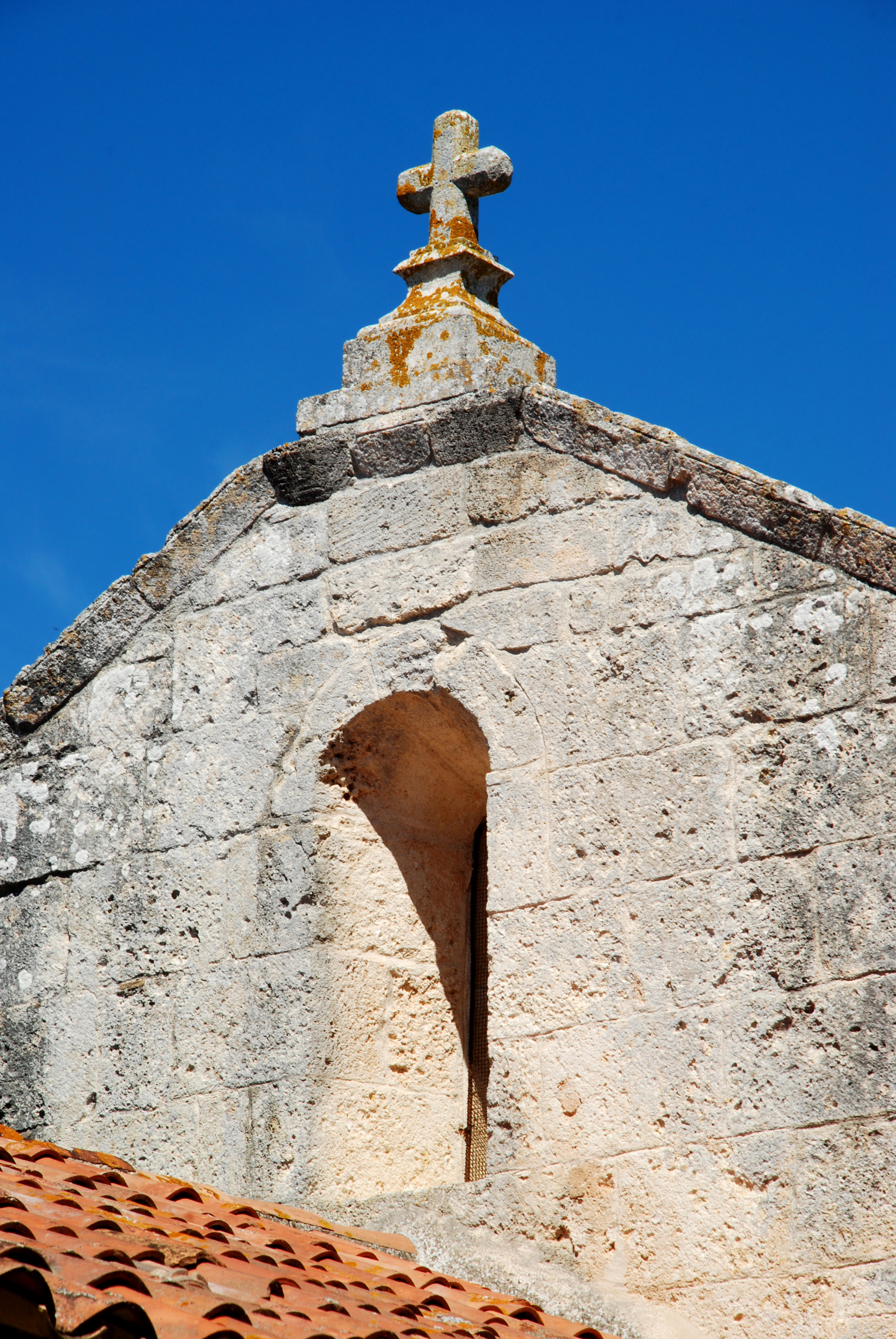 France - Hérault - Chapelle Notre-Dame-de-la-Pitié de Beaulieu